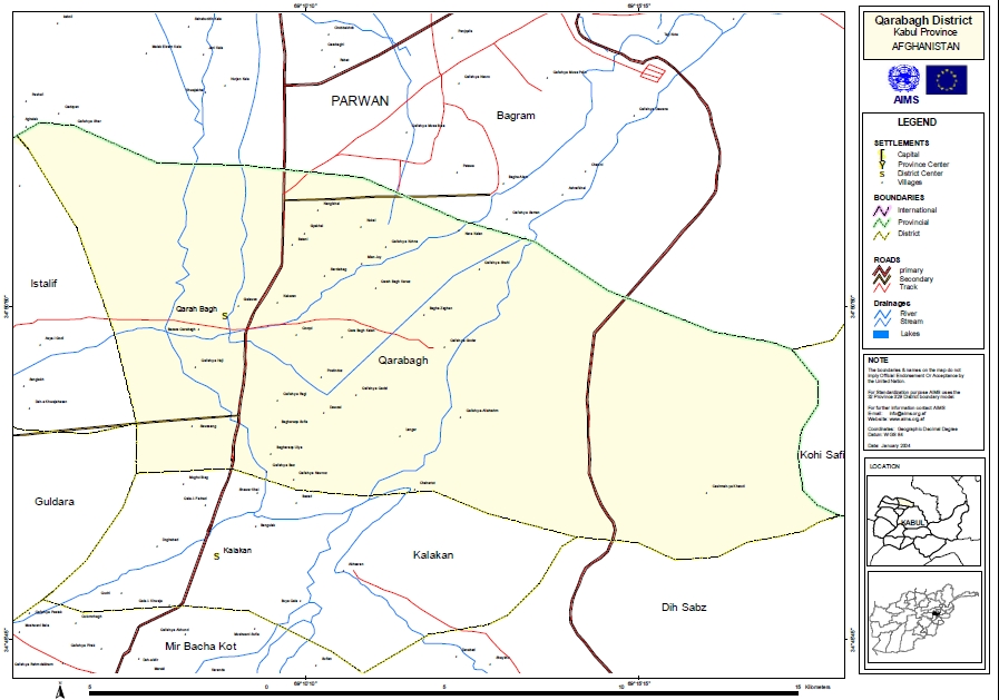 Karabağ haritası